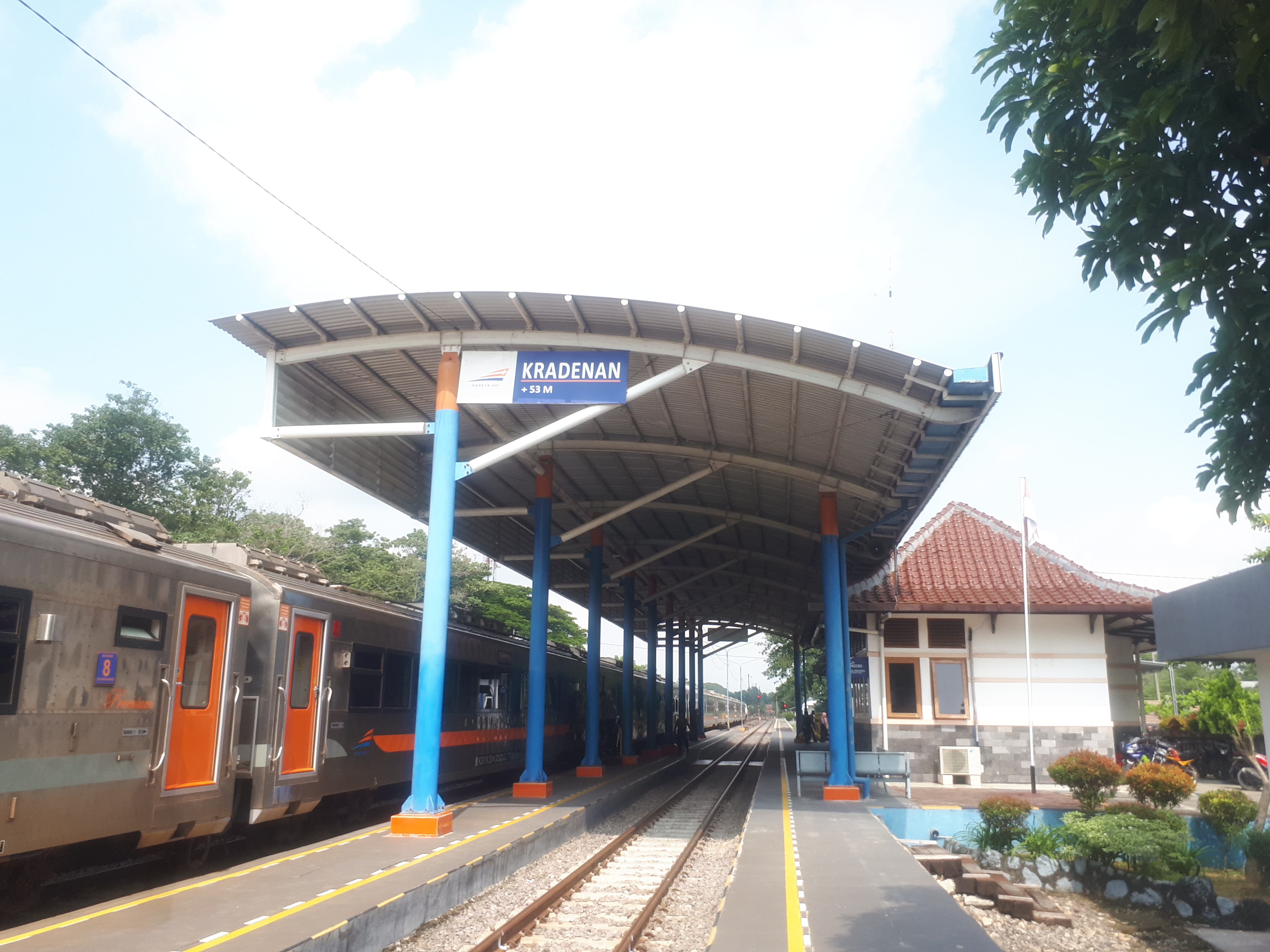 Bagian peron pada Stasiun Kradenan, 2020